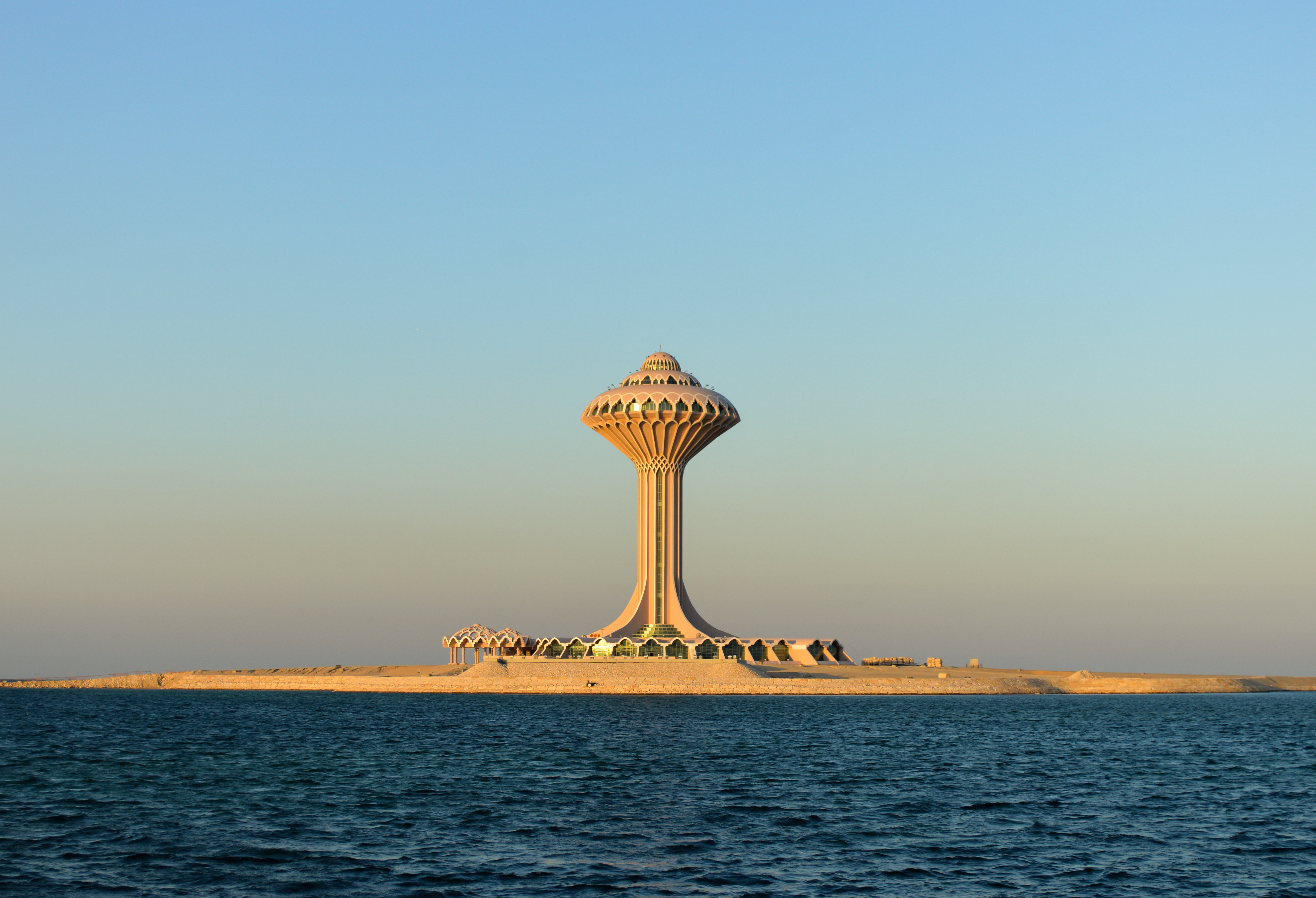 Khobar water tower